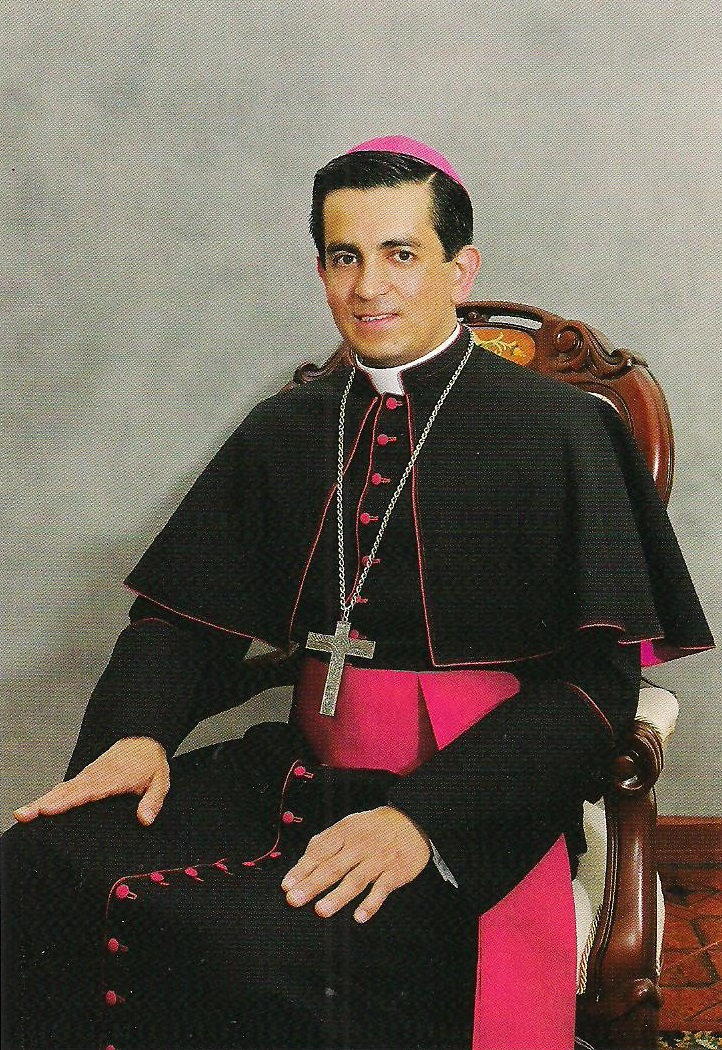 Monseñor Jaime Abril González